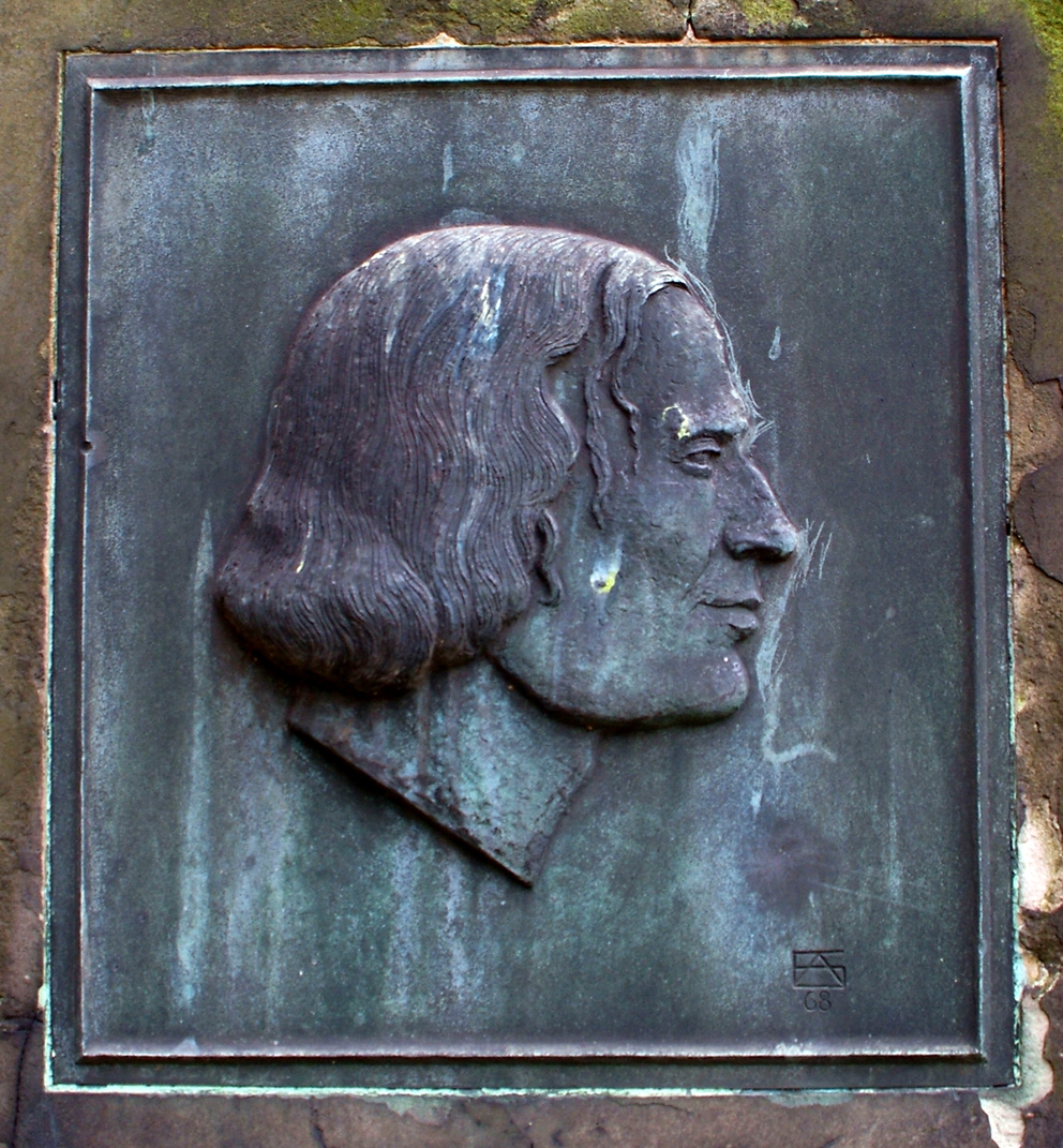 Grabmal des vor allem in Hannover tätigen Stadtbaumeisters August Heinrich Andreae auf dem Alten St.-Nikolai-Friedhof. Grabmal nahe dem Klagesmarkt-Kreisel Ecke Celler Straße 1968 nachgebildetes Reliefportrait von Friedrich Adolf Sötebier mit der Signatur des Künstlers aus den BuchstabenF A S.